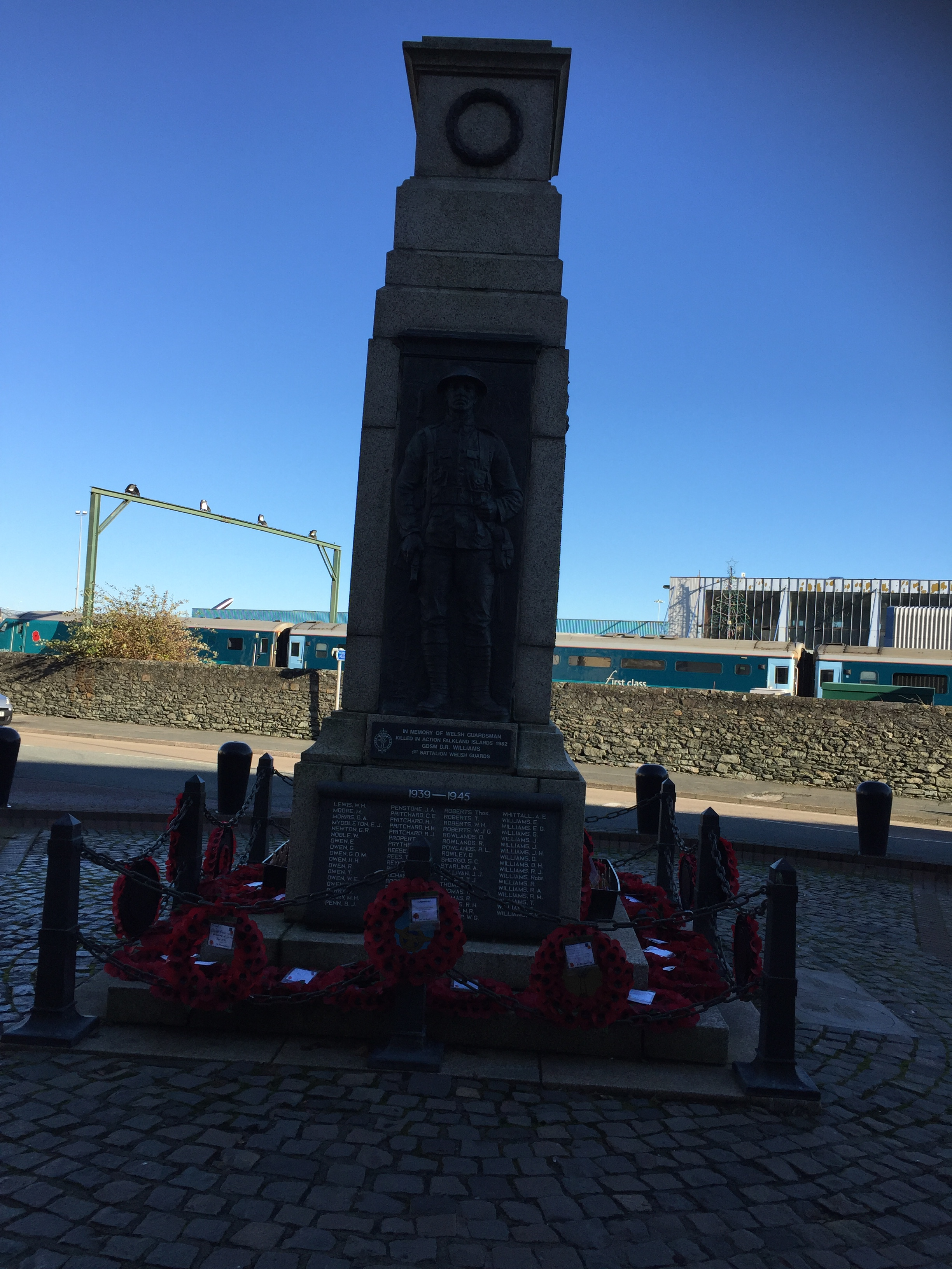 Cofeb Rhyfel Caergybi